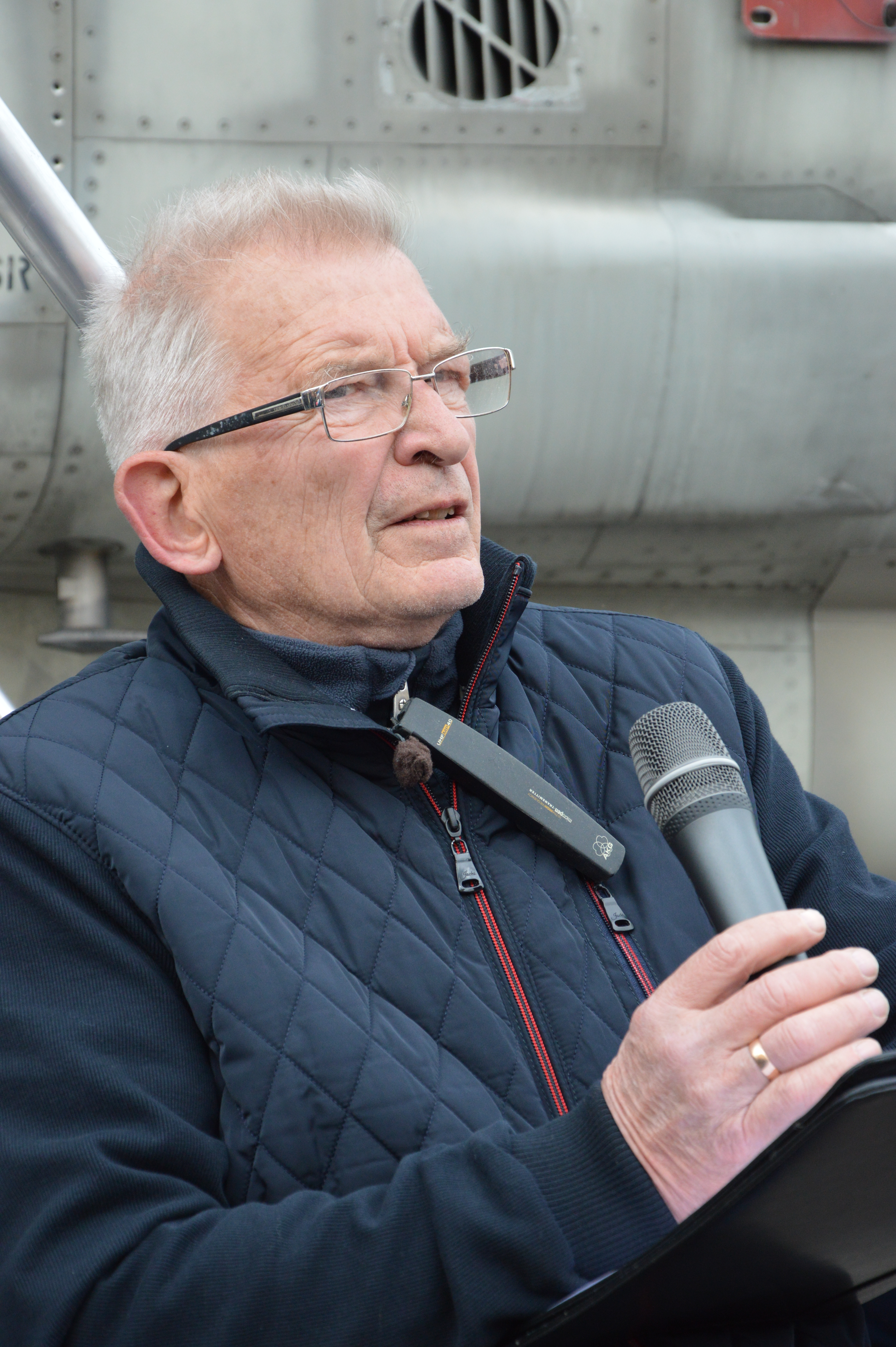 Mati Meos tutvustamas F-4 Phantom II hävitajat Eesti Lennundusmuuseumis 2017. aasta Eesti Lennupäevadel.